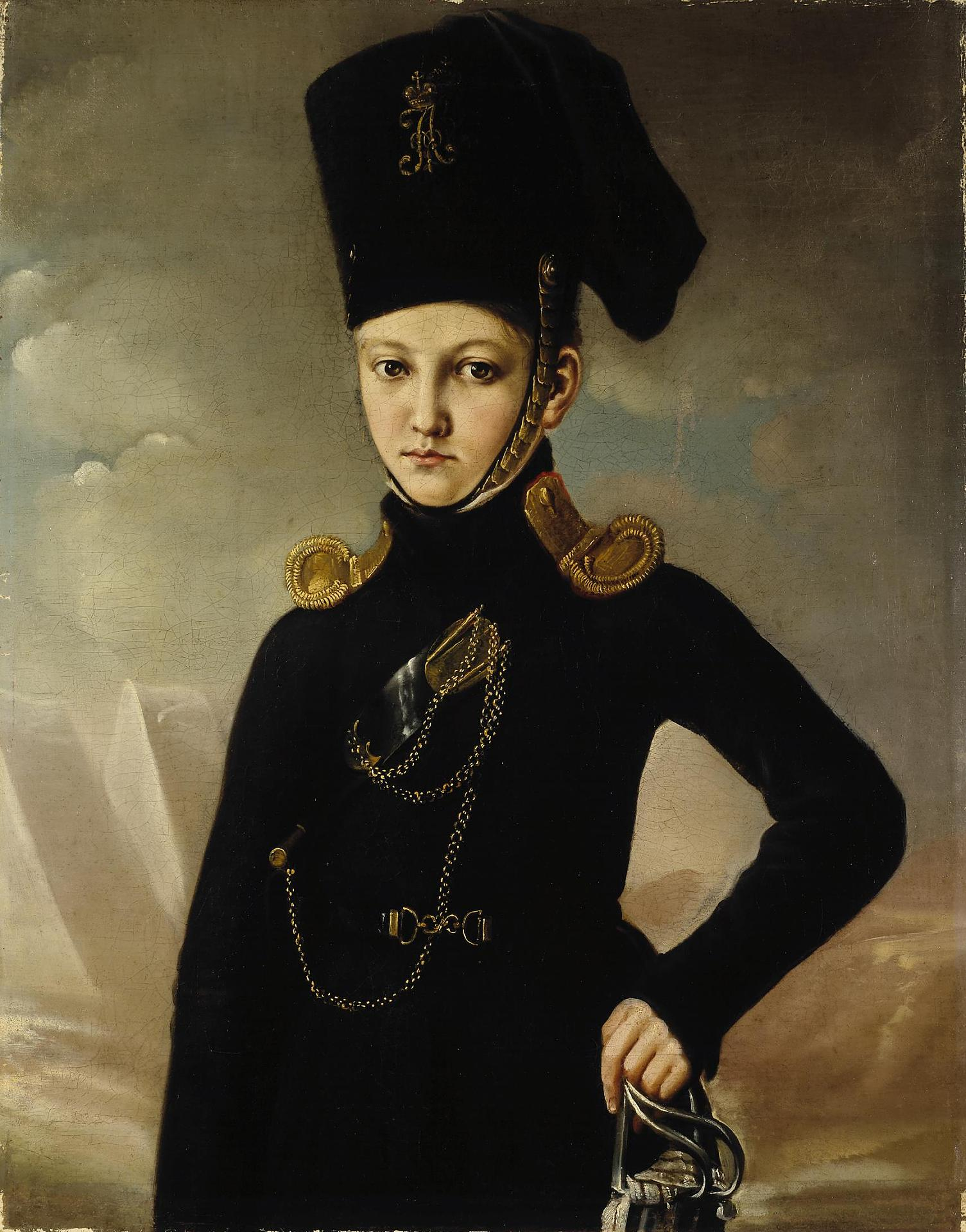 Портрет юного офицера Казачьего полка Дмитриева-Мамонова (Портрет офицера ополчения 1812 года) Неизвестный художник первой четверти 19 века Портрету молодого офицера была посвящена статья В.М. Глинки. где он писал: „Перед нами подросток, одетый в черную форму казачьего покроя с обер-офицерскими золотыми эполетами. Он в полной боевой готовности — с лядункой через плечо, снабженной шомполом и двумя шпильками—„протравниками" на цепочках (служившими для прочистки пистолетного механизма), левая рука опирается на саблю с офицерским темляком... Его форма наиболее близка к обмундированию конного полкаТульского ополчения, сформированного в 1812 году". В кругу музейных работников портрет много лет носил условное обозначение „портрета Пети Ростова", героя романа Л.Н. Толстого „Война и мир", погибшего в бою пятнадцатилетним мальчиком. Возраст младших офицеров во время наполеоновских войн 1805—1814 годов часто был очень юным. А.Н. Раевский и Н.Н. Раевский, П.Я. Чаадаев, А.С. Грибоедов, многие из будущих декабристов начинали военную службу в возрасте 15—16 лет. Техника: холст, масло Размеры: 74х58,5 см Инвентарный номер: ЭРЖ-150